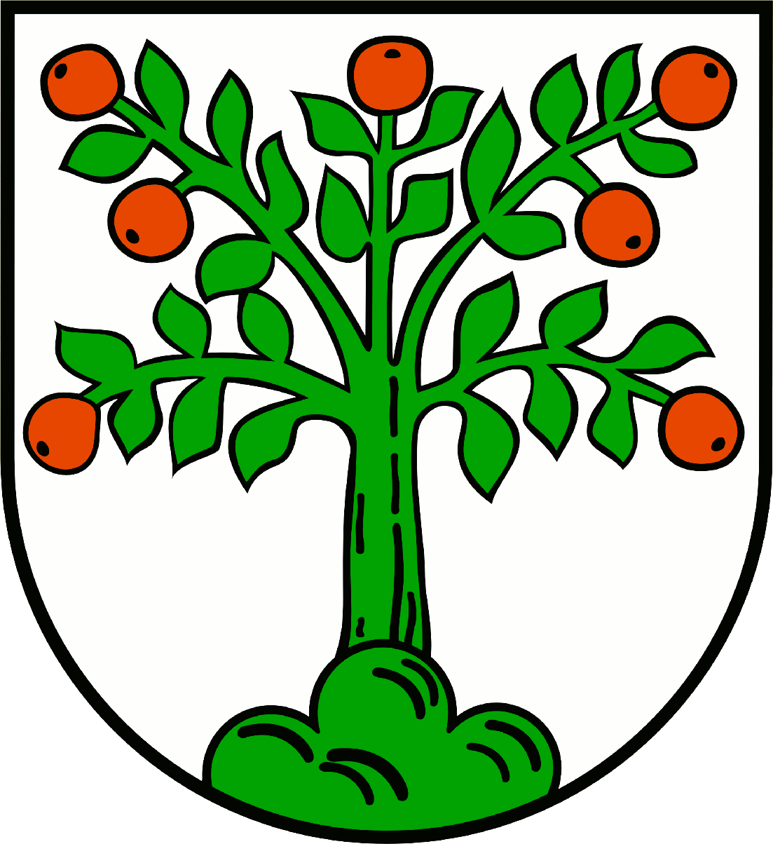 Wappen von Michendorf]